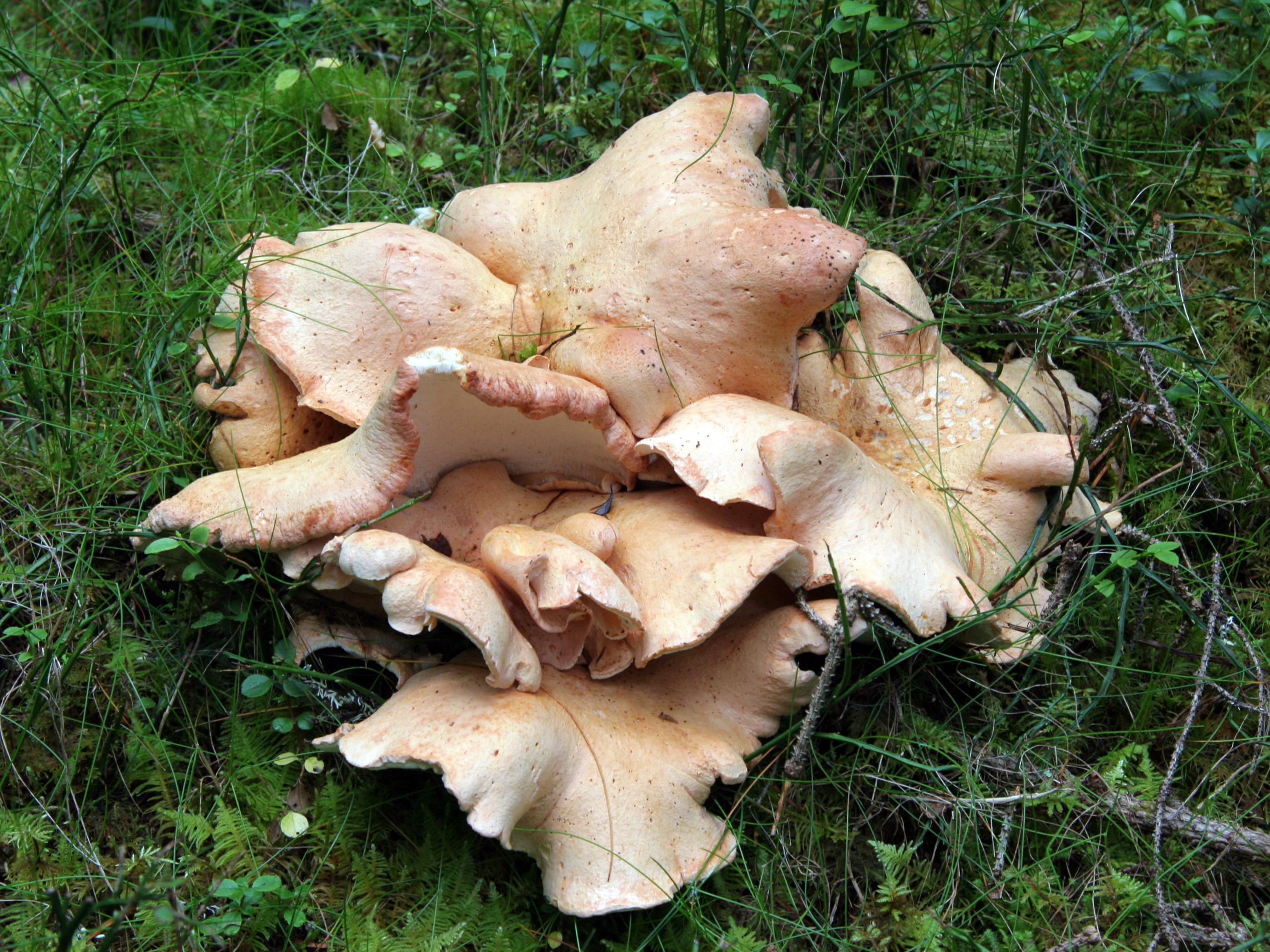 Brödticka